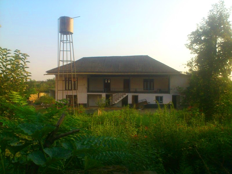 دونه سر